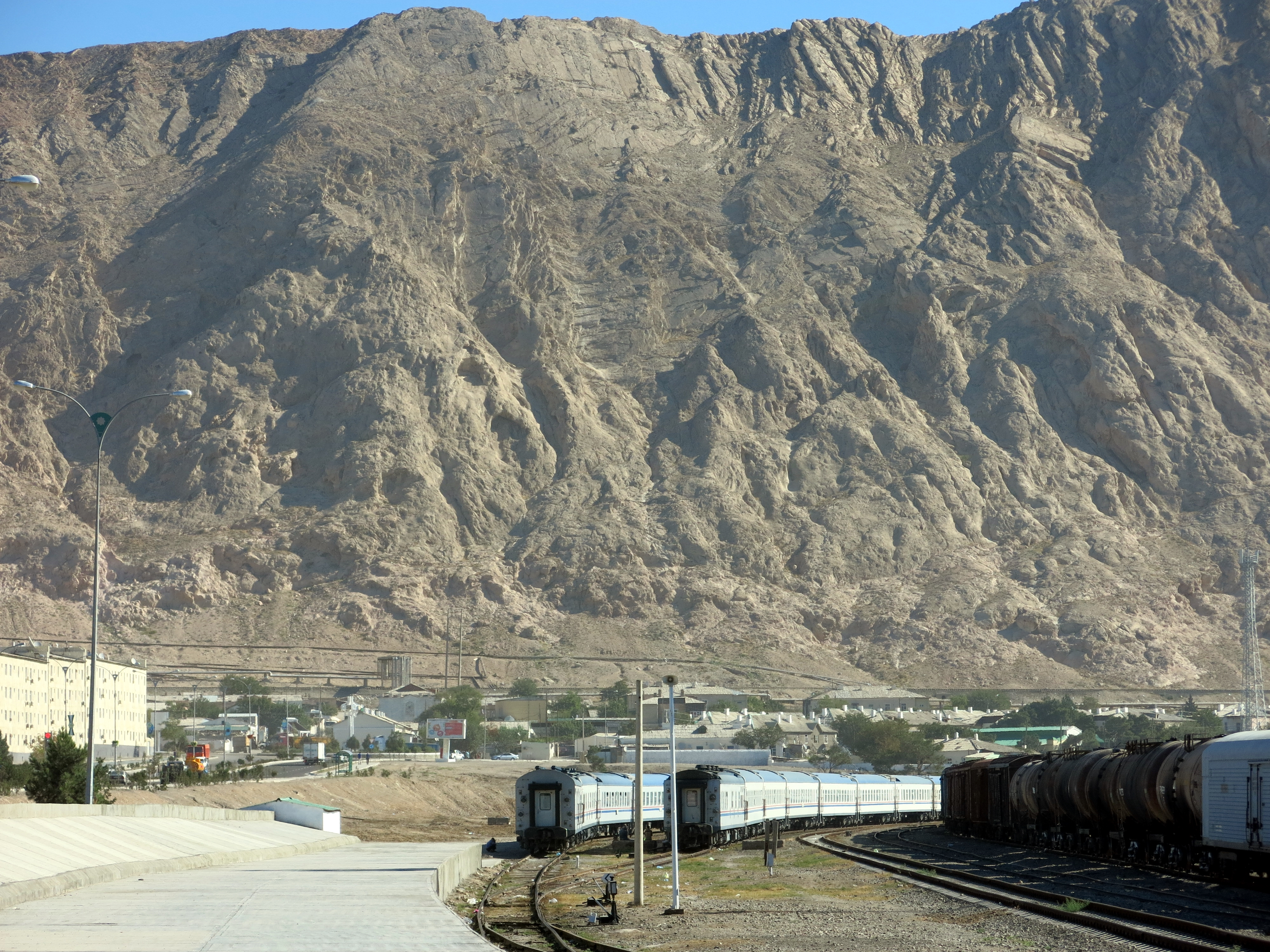 Blick vom Bahnsteig auf die Abstellgleise mit den Reisezugparks und das Küstengebirge